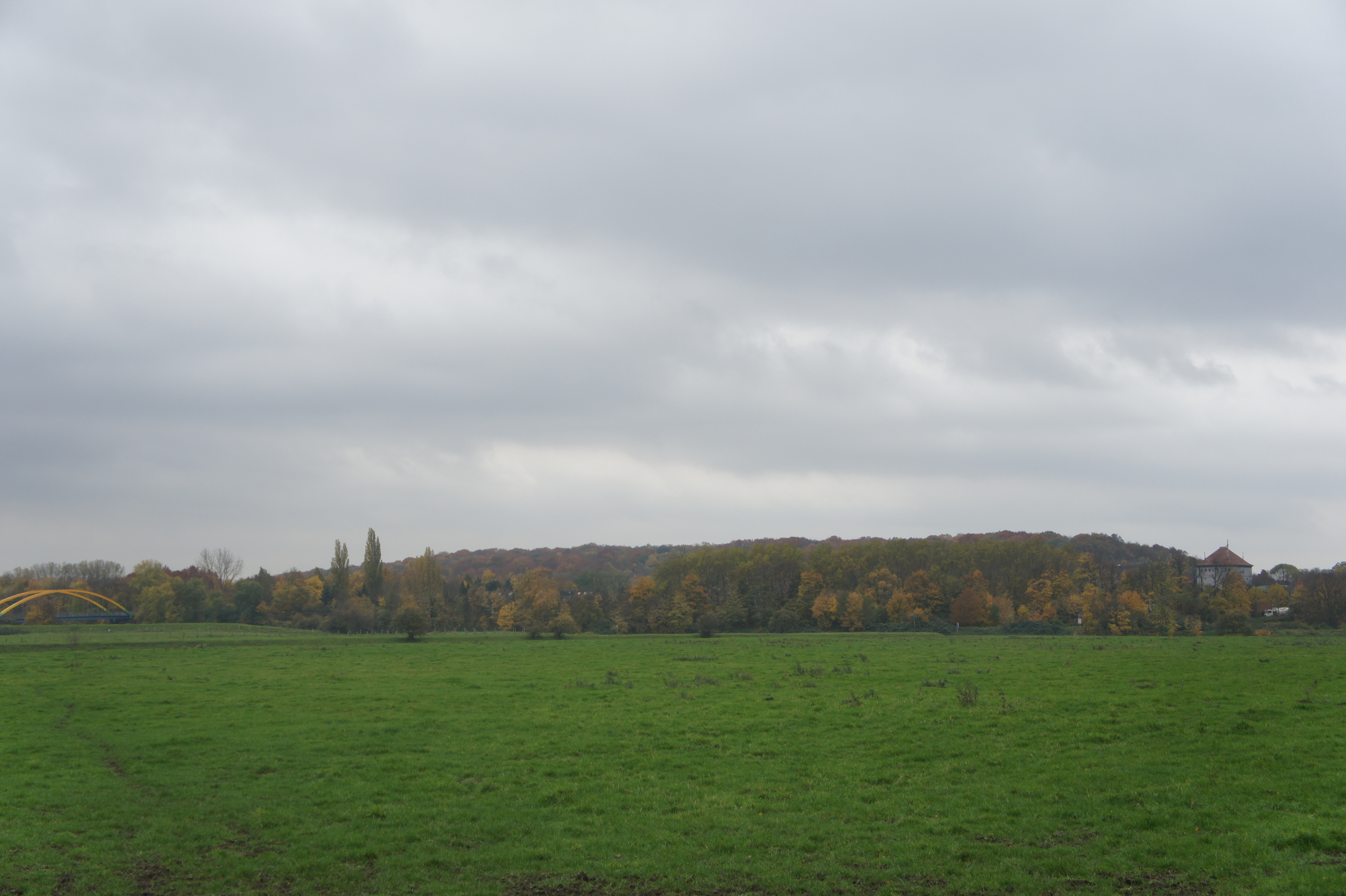 Der Kaiserberg in Duisburg. Blick aus den Ruhrauen über Werthacker hinweg